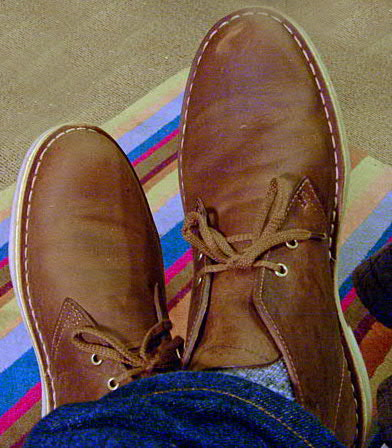 Clarks desert boot (beeswax)